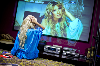 Анна Плетнёва (Съёмки клипа Ева)